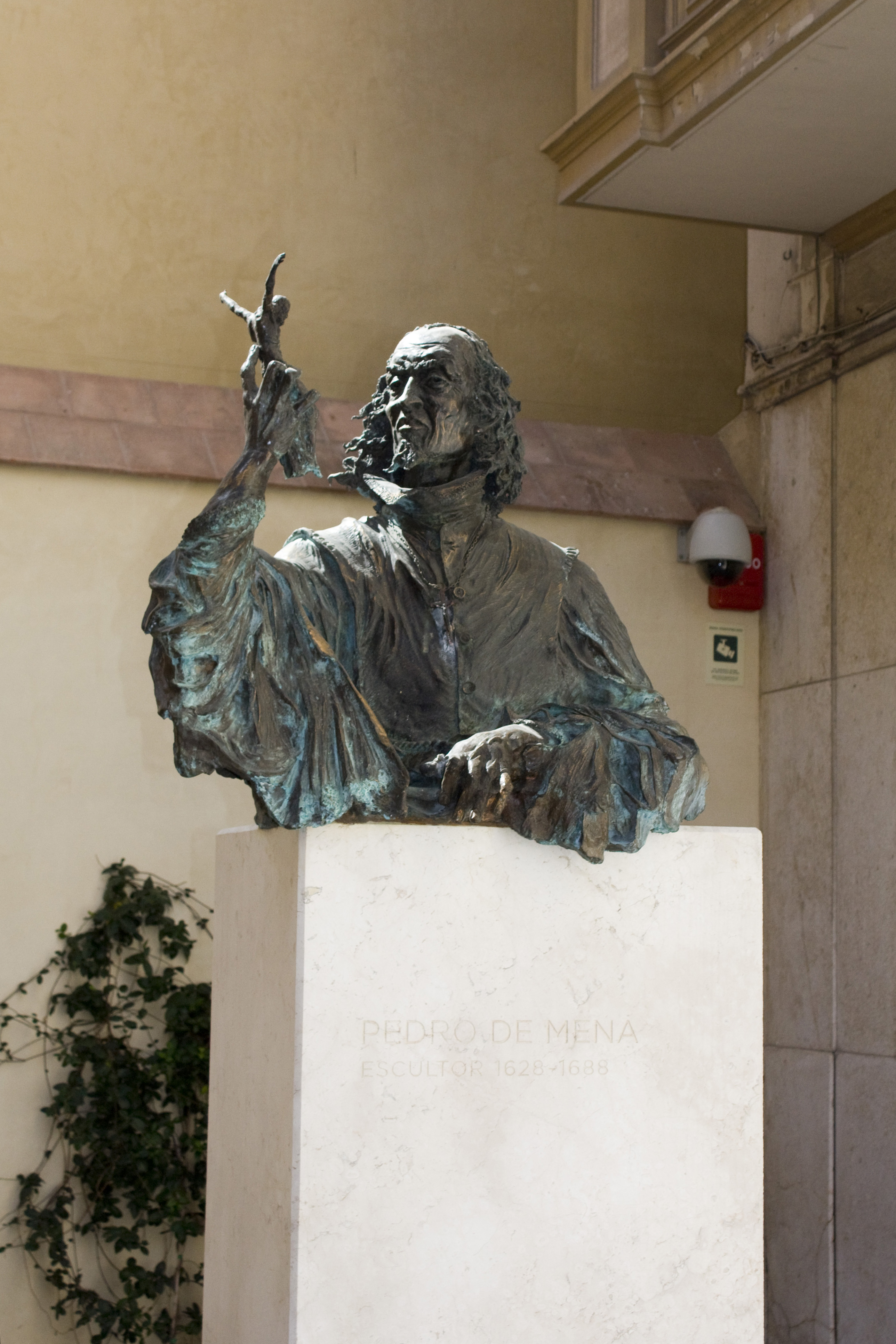 Buste de Pedro de Mena, sculpteur espagnol du XVII siècle